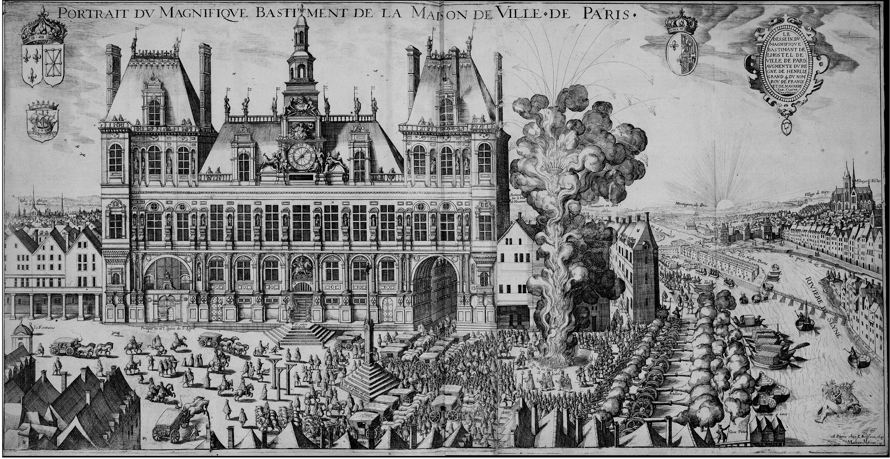 Hôtel de Ville de Paris et la place de grêve sous le règne de Henri IV. D'après le dessin de Claude Chastillon, gravure de Matthäus Merian, Boisseau 1645.